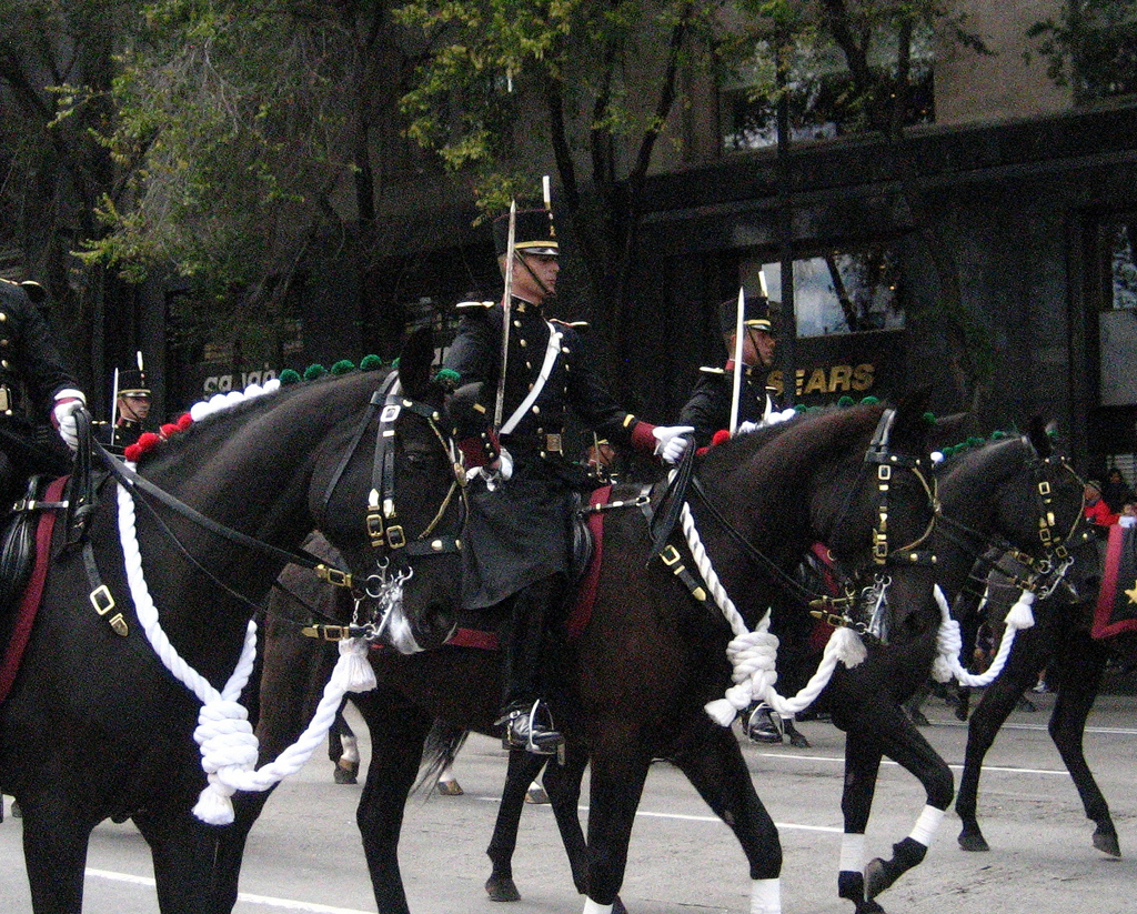 Fuerzas Armadas de México